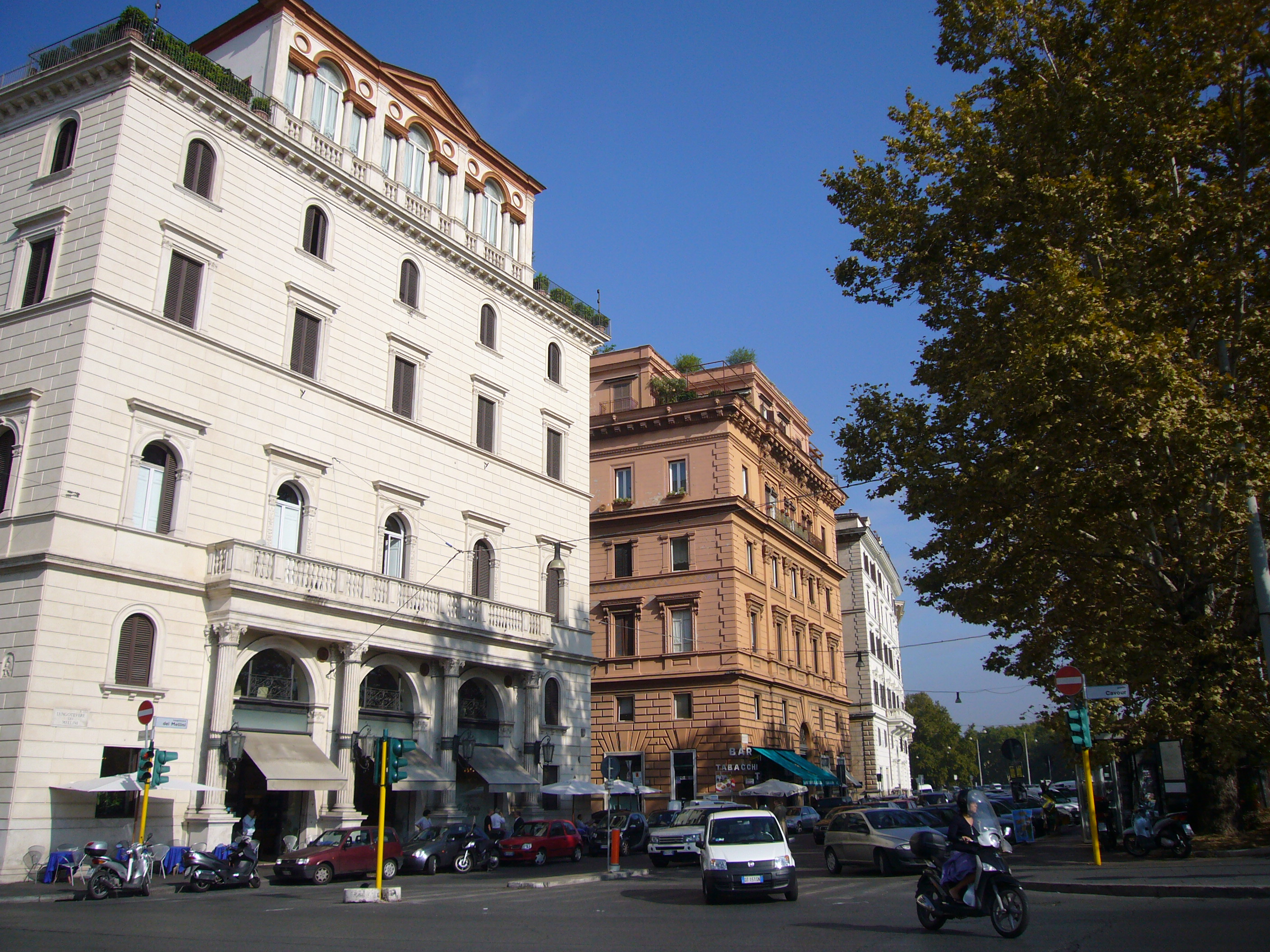 Roma, Lungotevere dei Mellini. In angolo, palazzo Blumenstihl